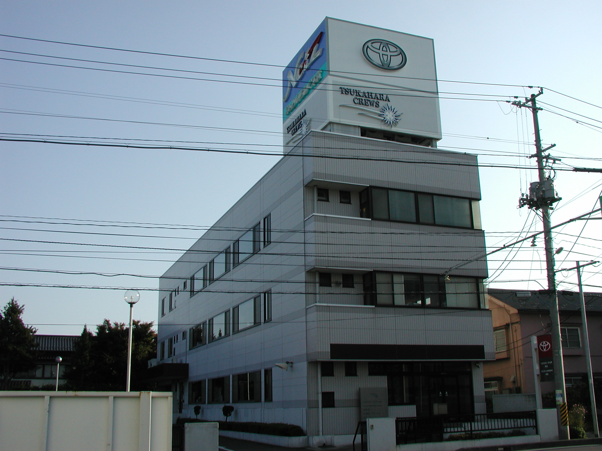 トヨタカローラ八戸本社・ネッツトヨタみちのく本社が入居する、有限会社塚原の本社屋